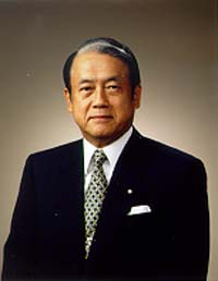 農林水産大臣就任に際して公表された肖像写真